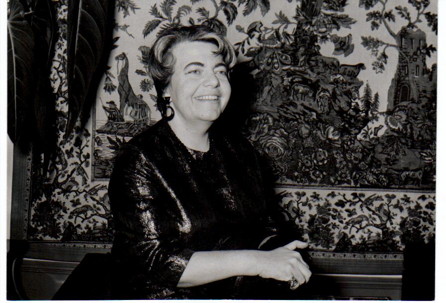 Ke Riema in 1960